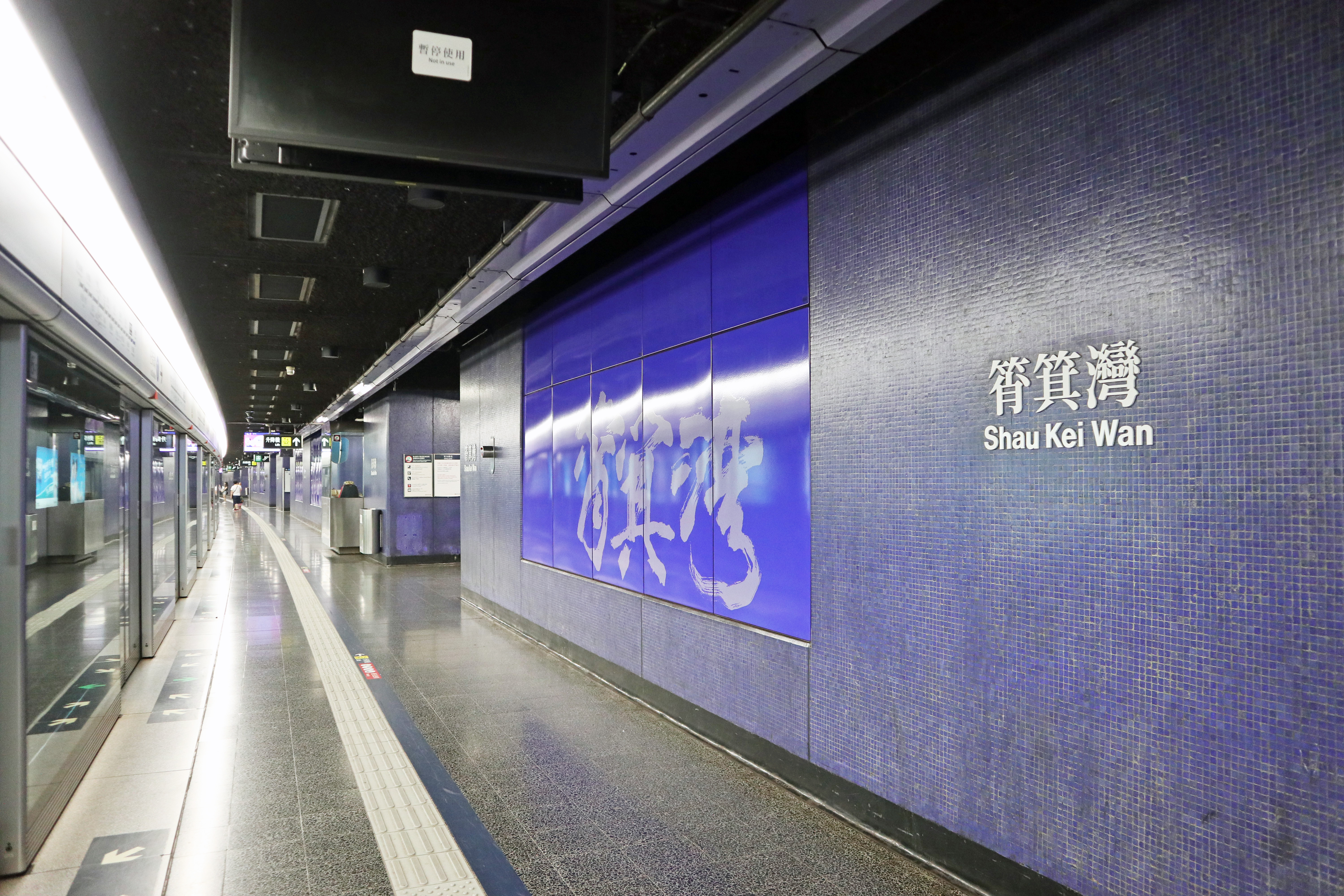 港鐵筲箕灣站月台